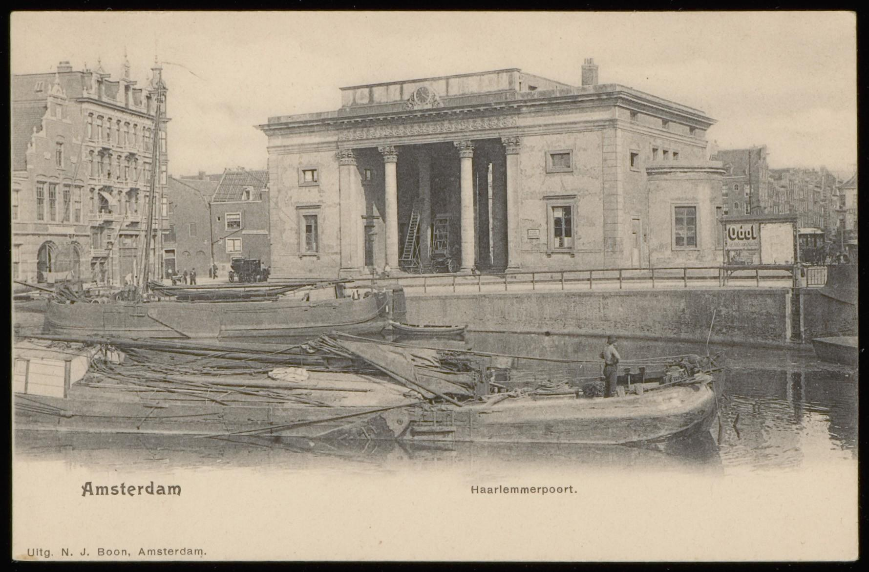 Beschrijving Haarlemmerpoort, Haarlemmerplein 5Links de brandweerkazerne en rechts de Haarlemmerdijk. In de Singelgracht wacht een tjalk tot de brug open gaat. Uitgave N.J. Boon, AmsterdamDocumenttype prentbriefkaartVervaardiger Boon, N.J. (uitgever)Collectie Collectie Stadsarchief Amsterdam: prentbriefkaartenDatering 1900 ca.Geografische naam HaarlemmerpleinHaarlemmerpleinSingelgrachtInventarissen PBKD00074000003 Generated with Dememorixer